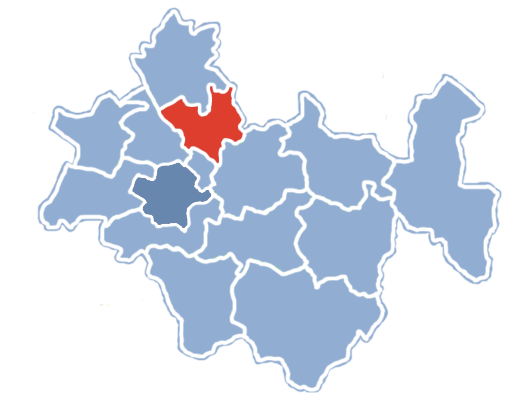 Położenie gminy Gomunice na terenie powiatu radomszczańskiego.